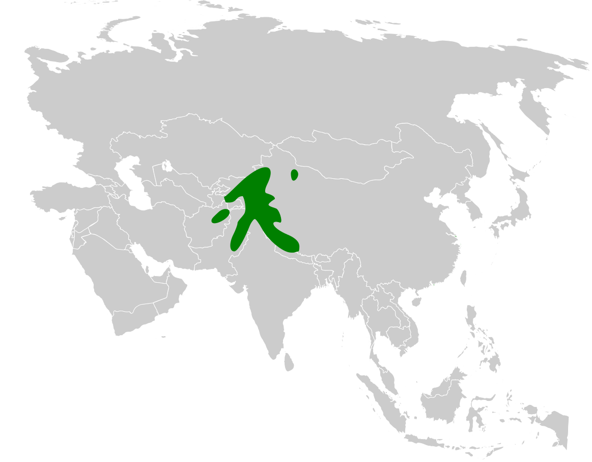 Periparus rufonuchalis distribution map